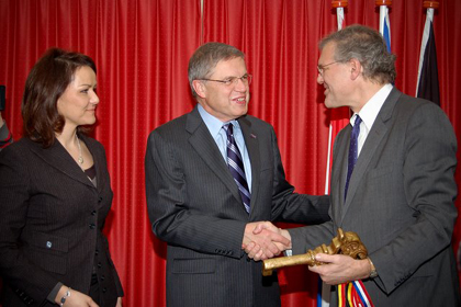 05-02-2010 Vandaag heeft de ceremoniële overdracht plaats gevonden van de penitentiaire inrichting Tilburg aan België. Tijdens de bijeenkomst in de PI Tilburg waren minister Hirsch Ballin, staatssecretaris Albayrak en de Belgische minister van Justitie, Stefaan De Clerck aanwezig. De gevangenis werd symbolisch overgedragen middels de overhandiging van een grote sleutel door minister Hirsch Ballin aan zijn Belgische collega. De ceremonie werd bijgewoond door genodigden uit België en Nederland.